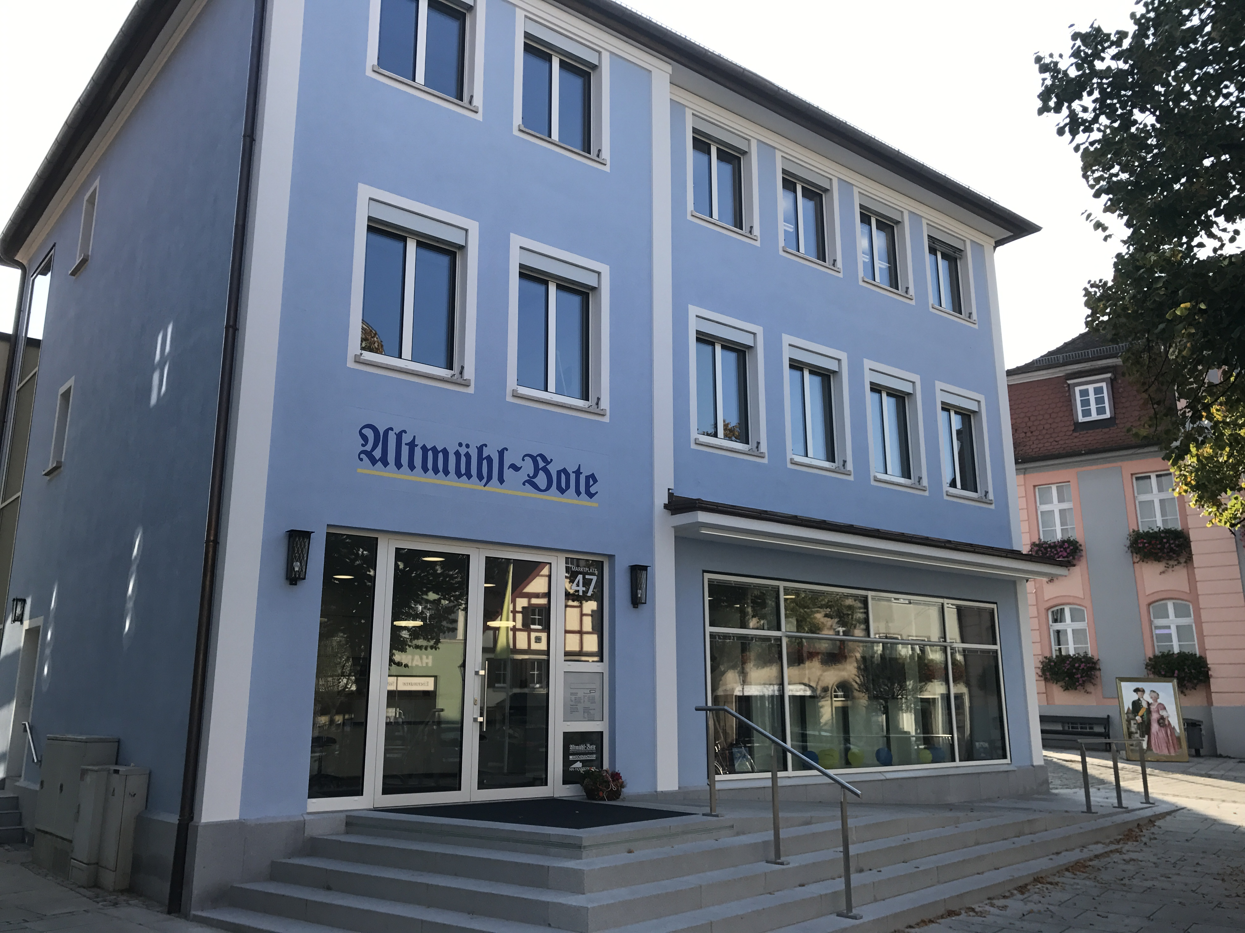 Gebäude des "Altmühl-Boten" am Marktplatz in Gunzenhausen.